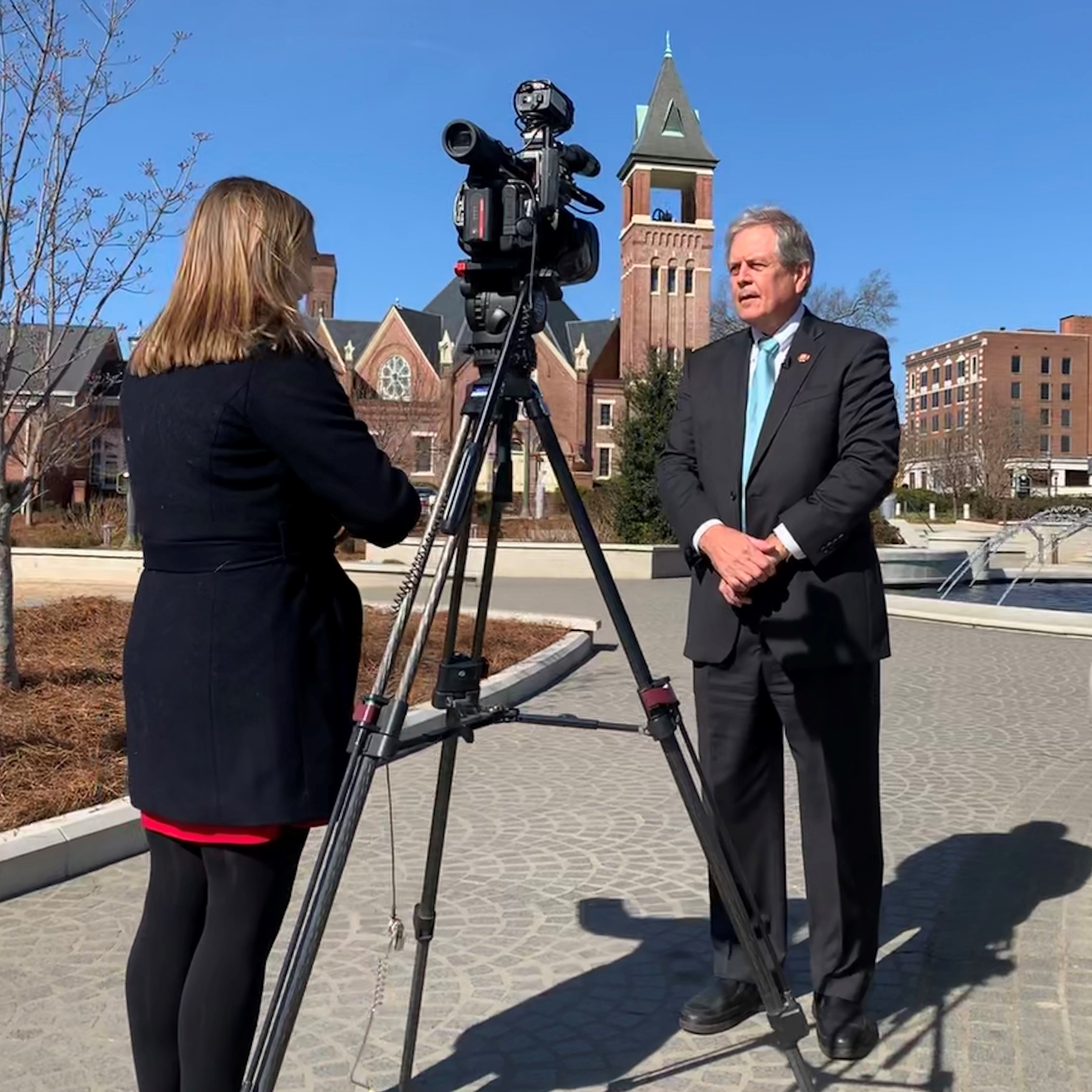 U.S. Rep Ralph Norman being interviewed in 2019